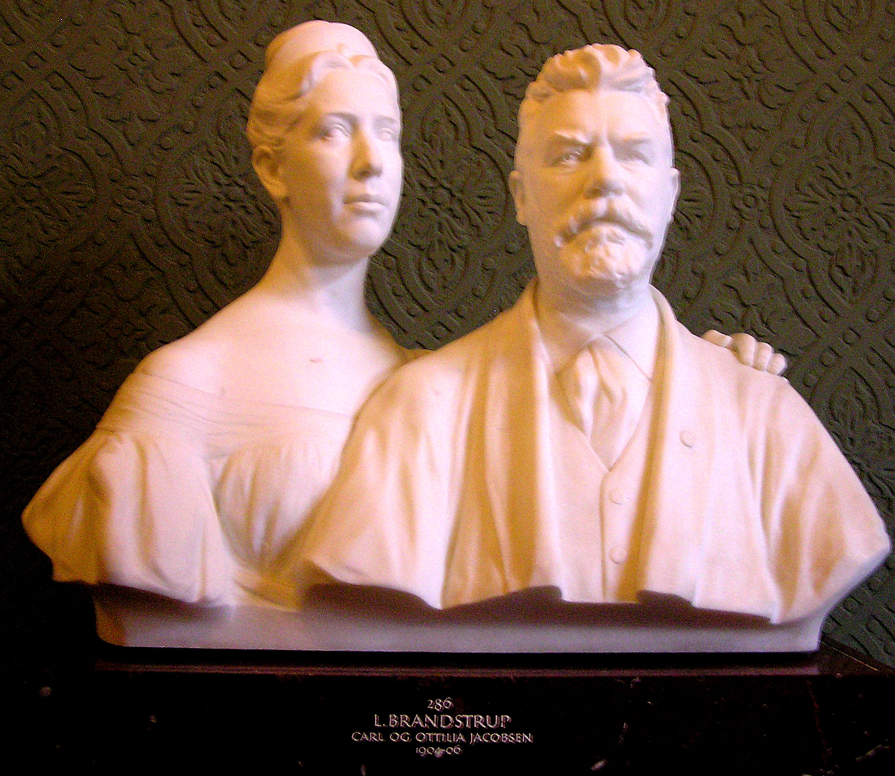 Carl og Ottilia Jacobsen, Ejer af Ny Carlsberg og grundlægger af Ny Carlsberg Glyptotek